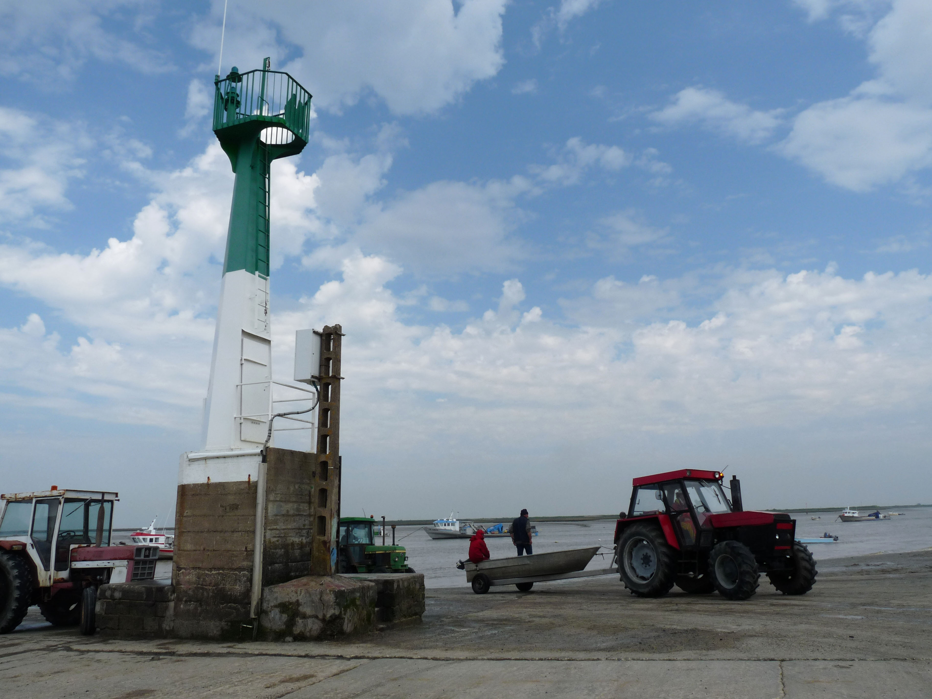 Port du Pavé à Charron (Charente-Maritime)